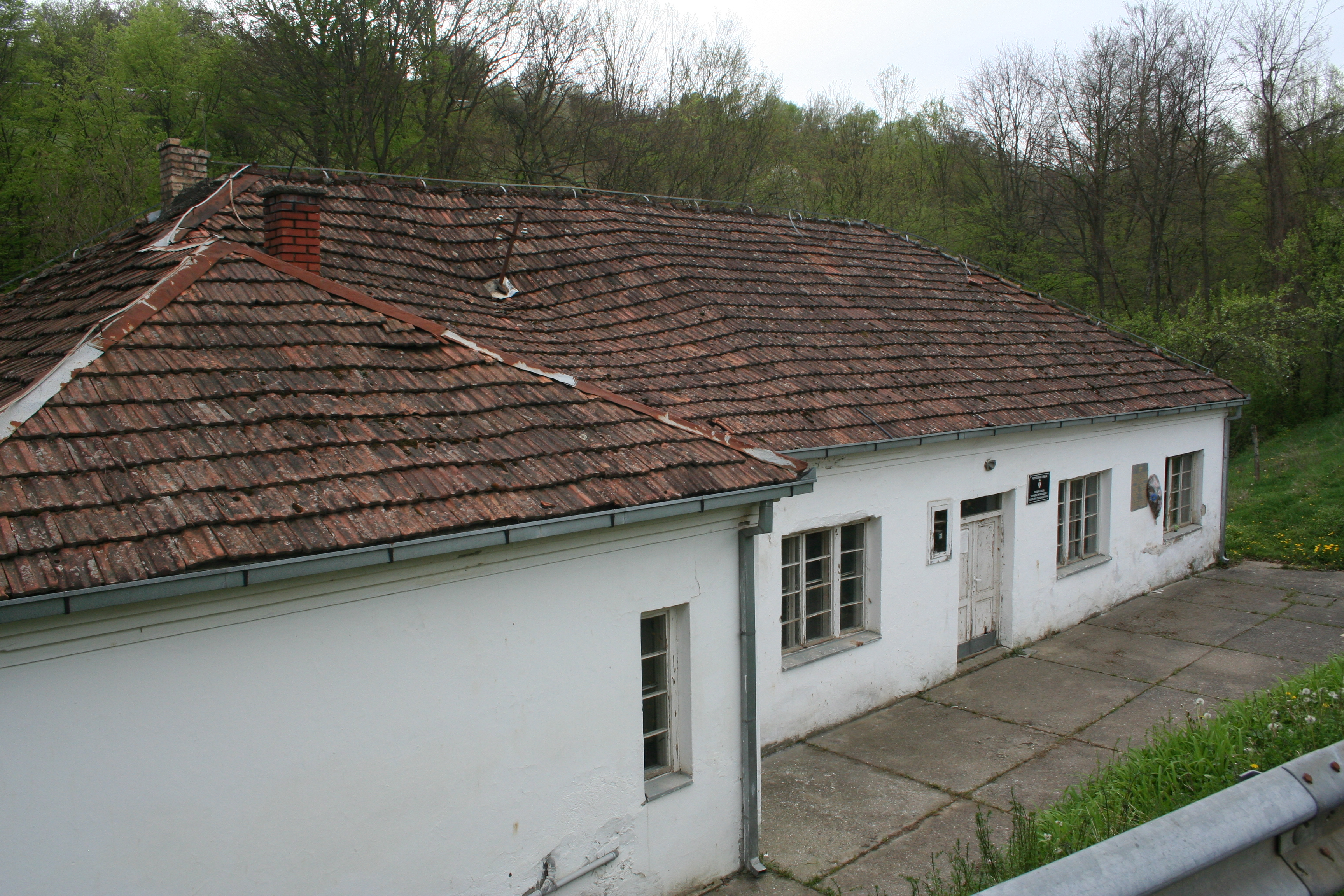 Zgrada škole, Kržava